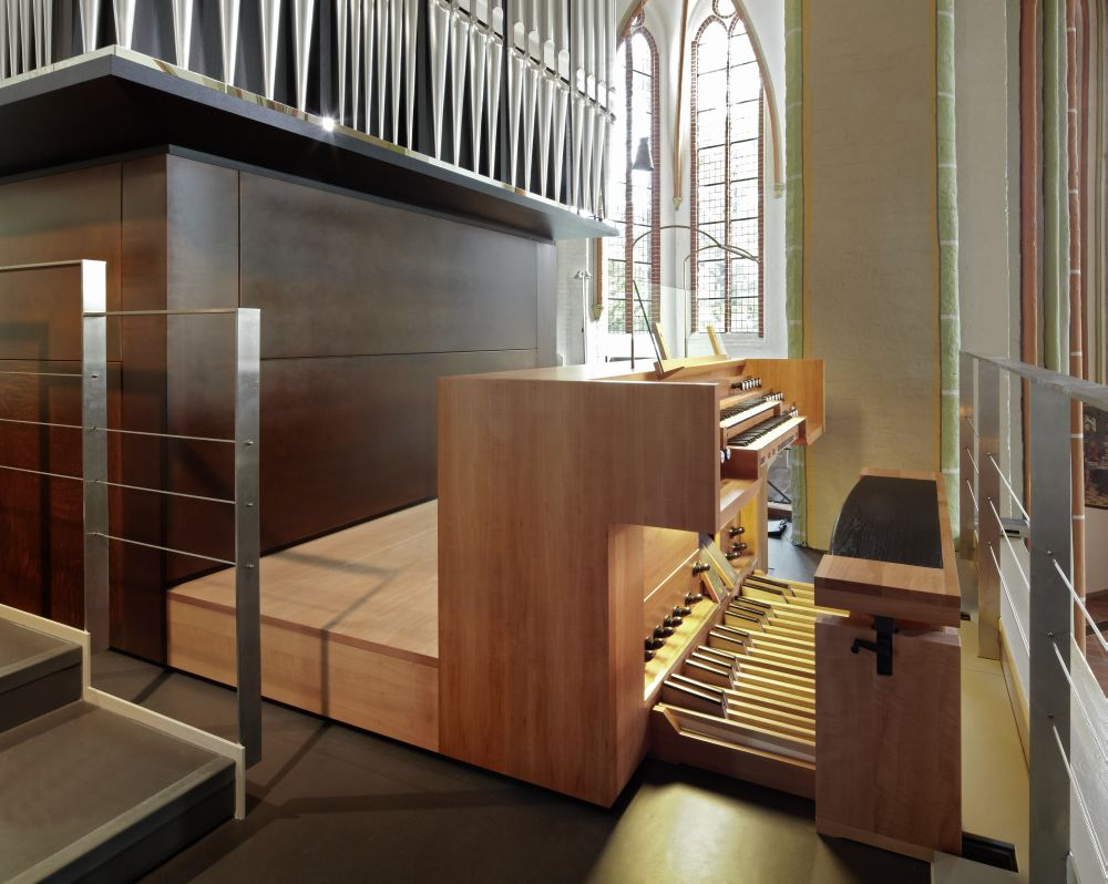 Spieltisch der Chororgel in Lüneburg, St. Johannis